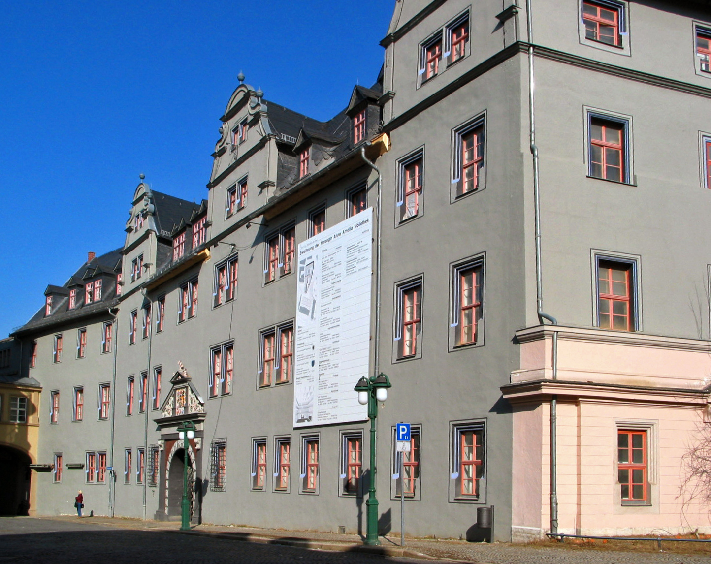 Das Rote Schloss wurde 1574-76 als Witwensitz für die Herzogin Dorothea Susanna errichtet. Unterirdische Gänge verbanden es mit dem Stadtschloss und dem Grünen Schloss. Hier war im 18. Jh. die von Johann Wolfgang Goethe und Friedrich Justin Bertuch gegründete Freie Zeichenschule untergebracht; später diente es als Ministerialgebäude. Heute ist darin die Erweiterung der Anna-Amalia-Bibliothek.